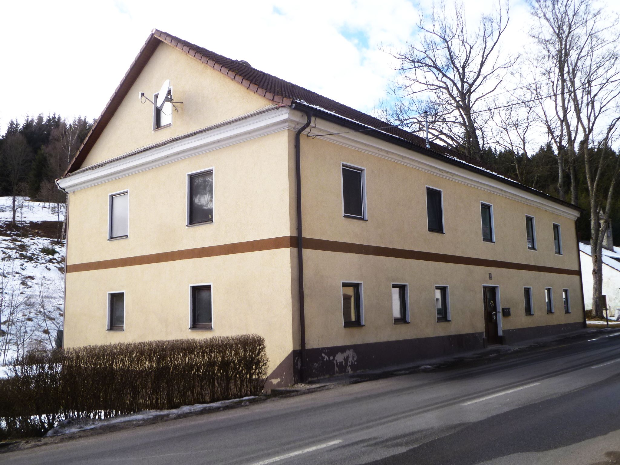 Schlossgebäude Harrachstal (Forsthaus) in Weitersfelden (Oberösterreich)